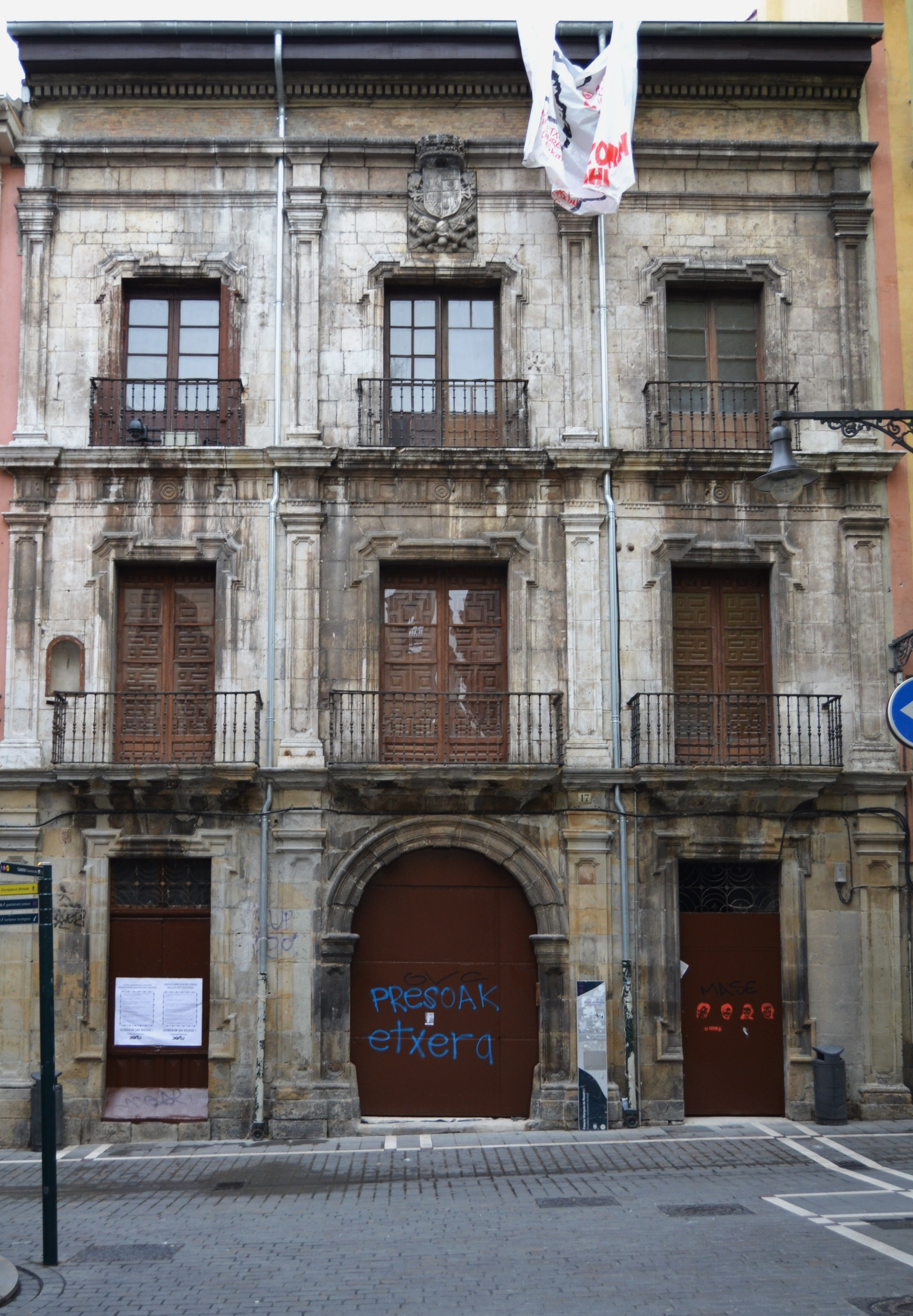 Rozalejo Jauregia.